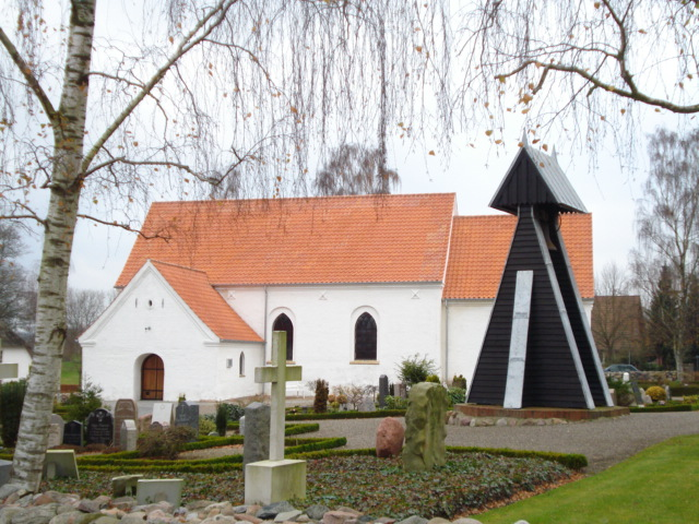 Ørum Church, Hedensted, Jutland, Denmark